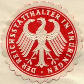 Sealing stamp Title: Der Reichsstatthalter in Thüringen Description: rot, weiß, geprägt Place: size: 4 cm